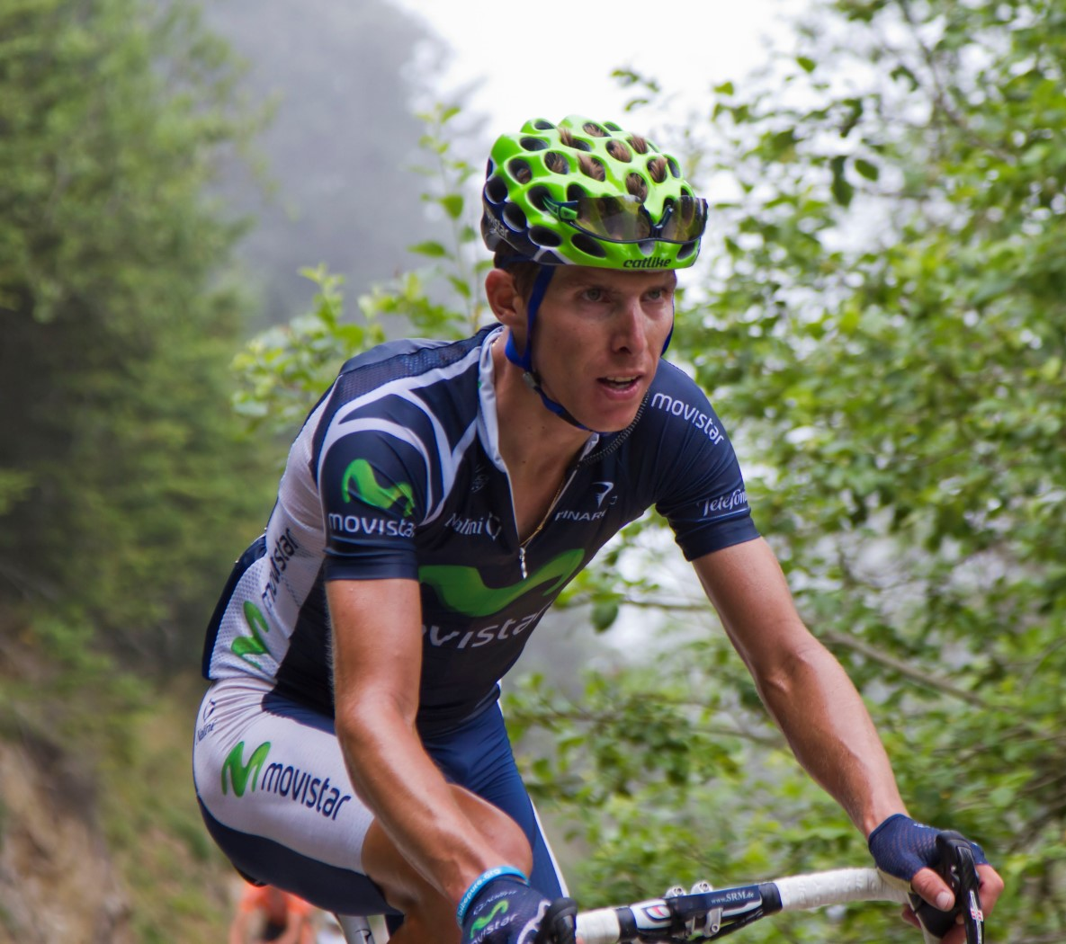 018 rui costa